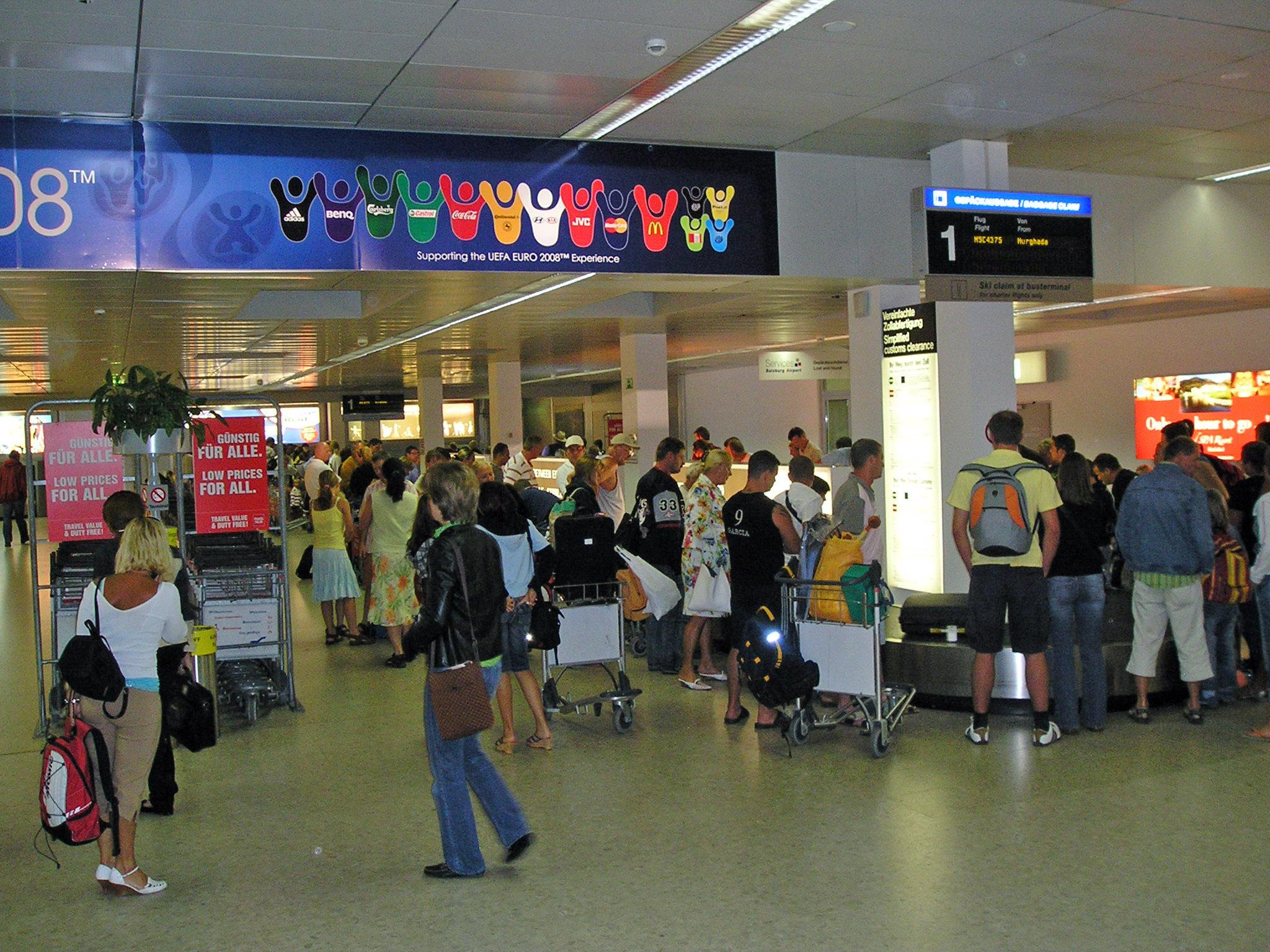 Salzburg Airport in Austria